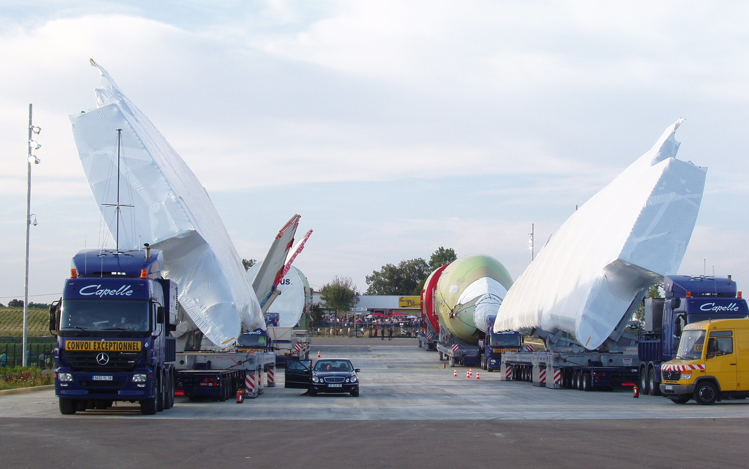 Convoi éléments Airbus A380 sur IGG à Eauze (Gers)